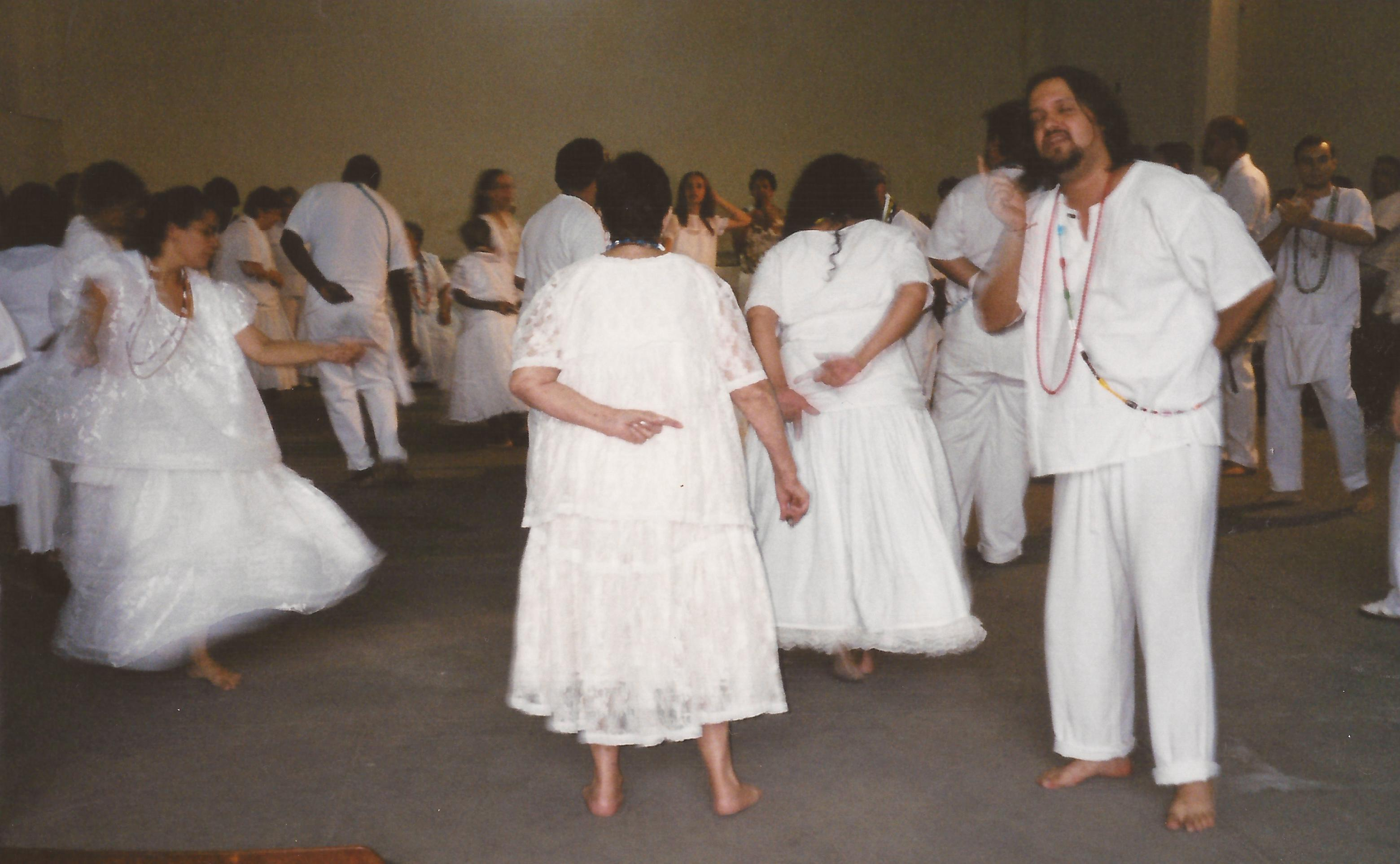 Sessão de Umbanda realizada na festa da União Espiritista de Umbanda do Brasil, no Rio de Janeiro, Brasil.